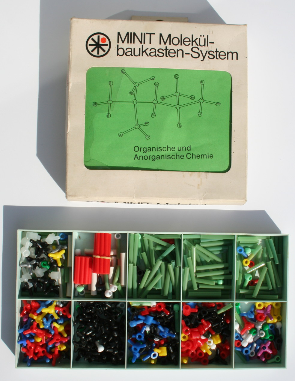 Molekülbaukasten